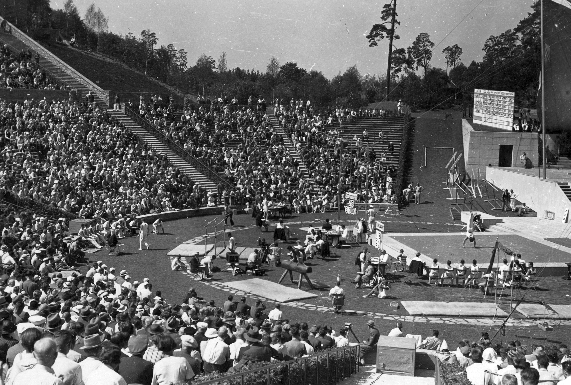 Waldbühne lelátói az 1936. évi nyári olimpiai játékok alatt. Location: Germany, Berlin Tags: Berlin Olympics, Olympics, exercise Title: Waldbühne lelátói az 1936. évi nyári olimpiai játékok alatt.